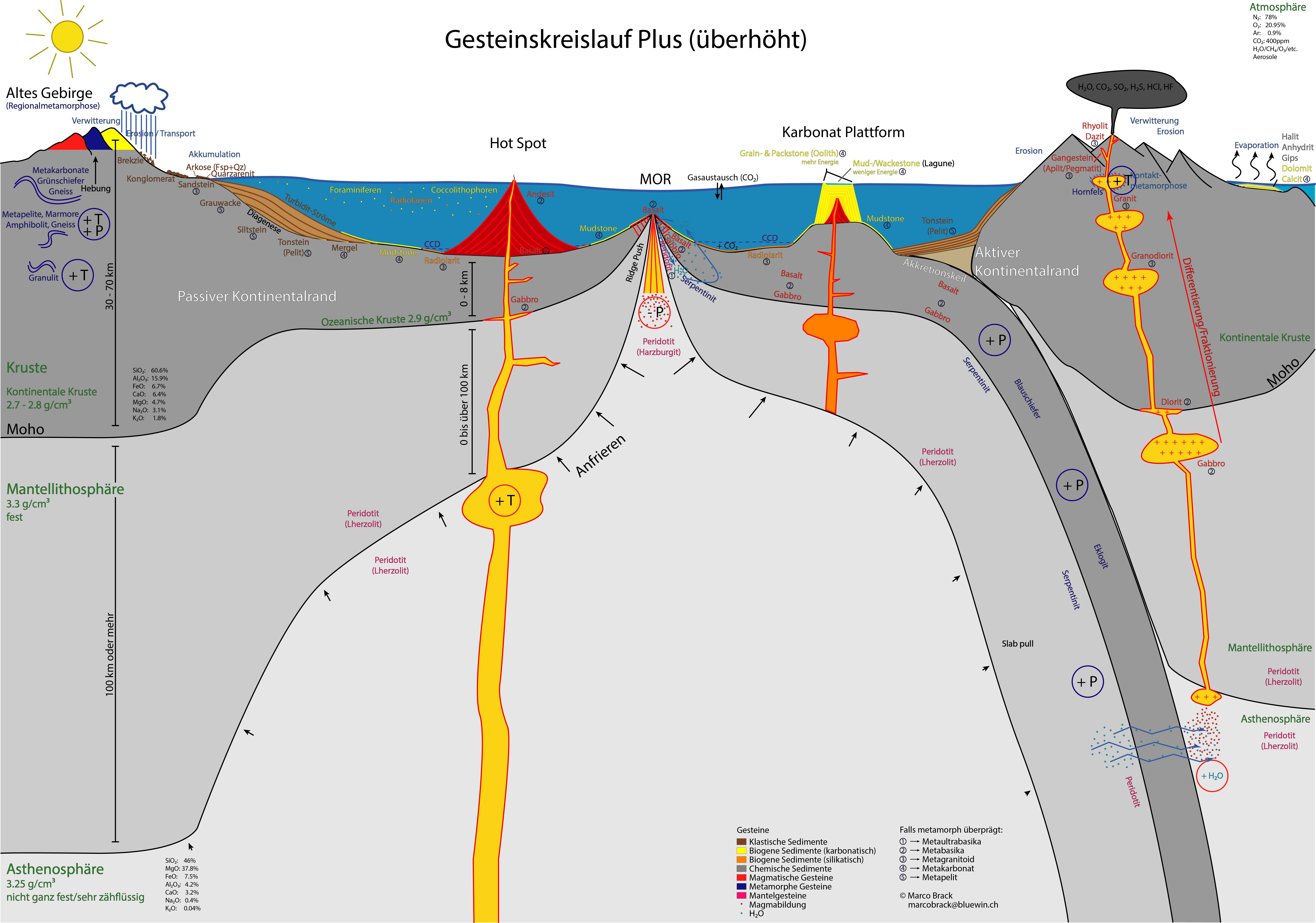 Schema des Gesteinskreislaufs mit den Entstehungsorten der verschiedenen Gesteinsarten.